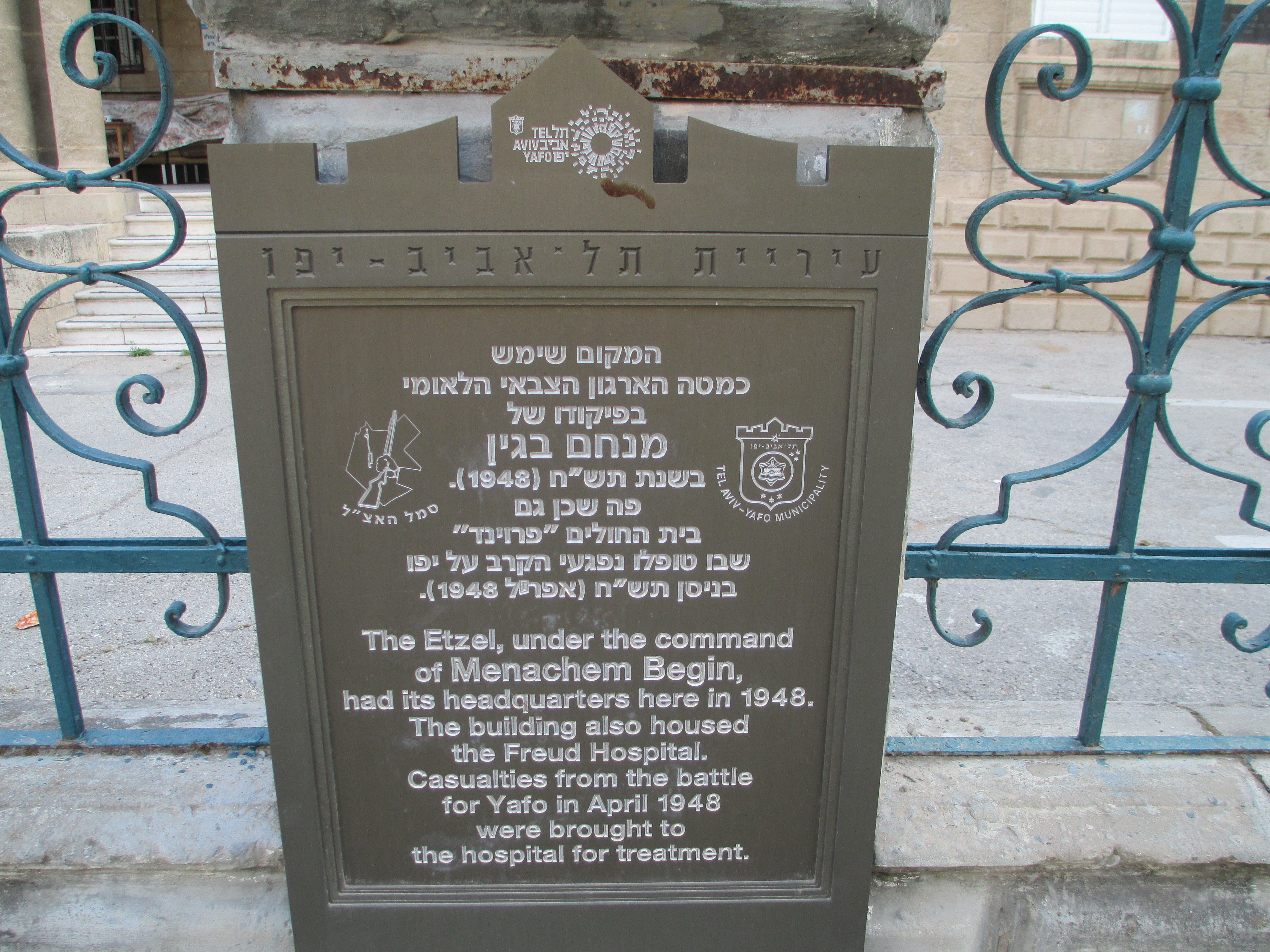 לוחית זיכרון של אצ"ל בבי"ח לשעבר "פרויד" ברחוב יהודה הלוי 9 בתל אביב